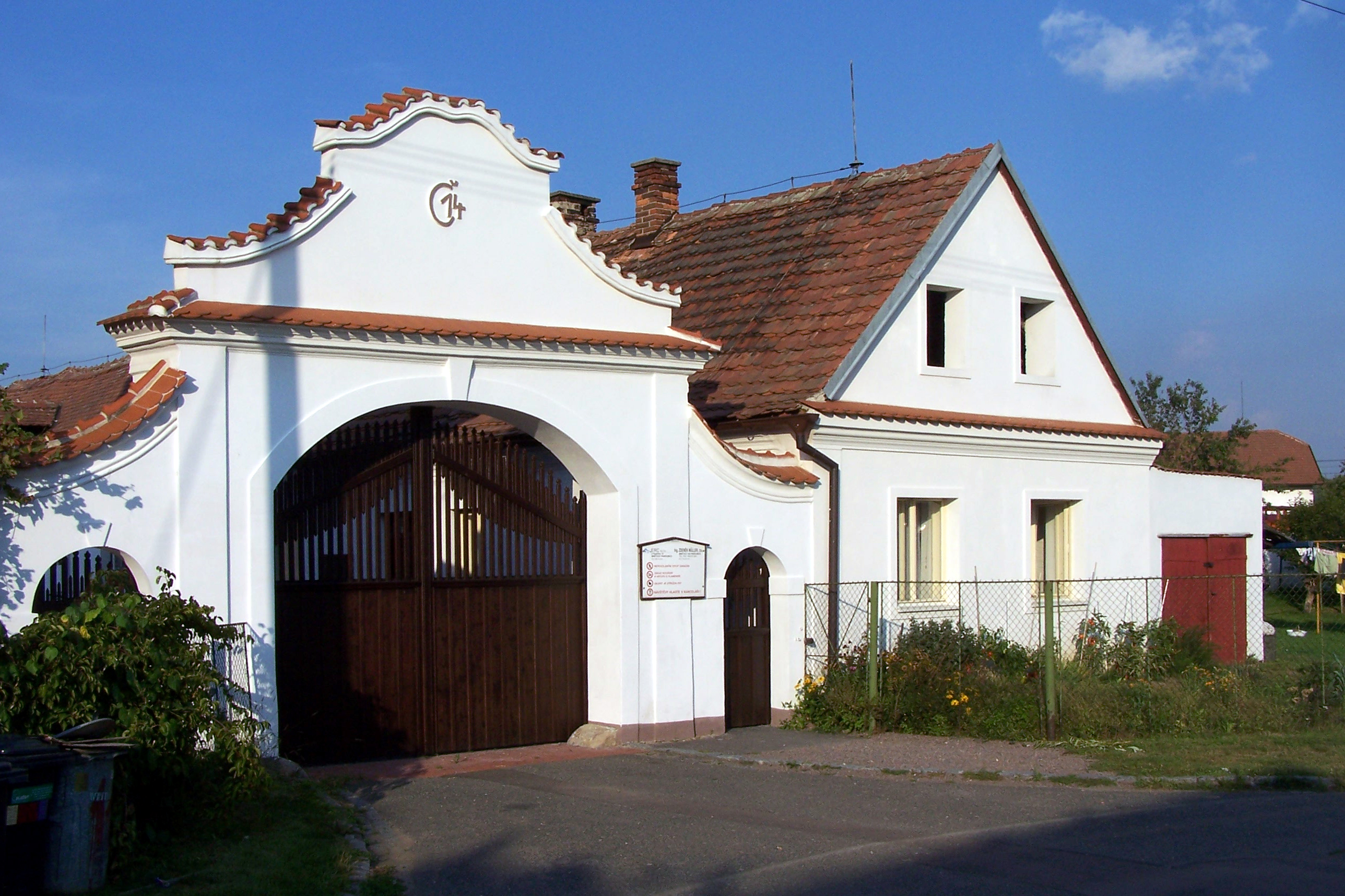 Mnětice, opravená část statku. GPS: 50°0'53.557"N, 15°50'4.609"E